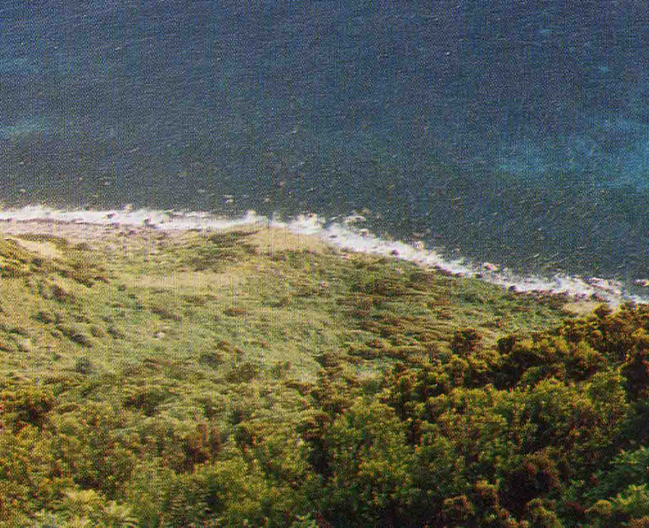 Fajã Fernando Afonso, ilha de São Jorge, Açores, Portugal.